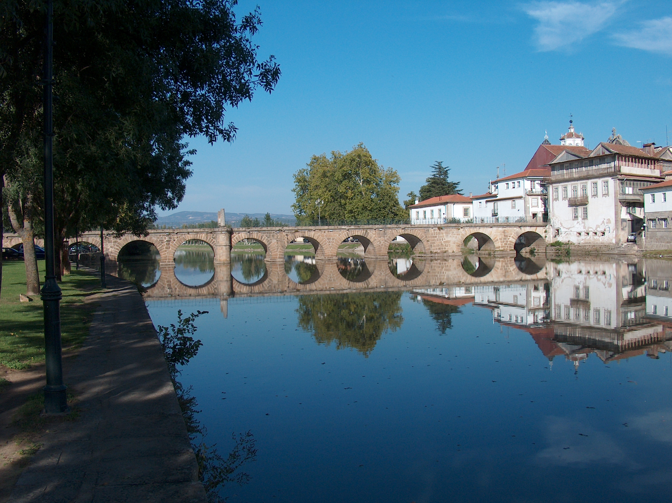 Ponte romana e as duas colunas comemorativas do tempo dos imperadores Vespasiano e Trajano